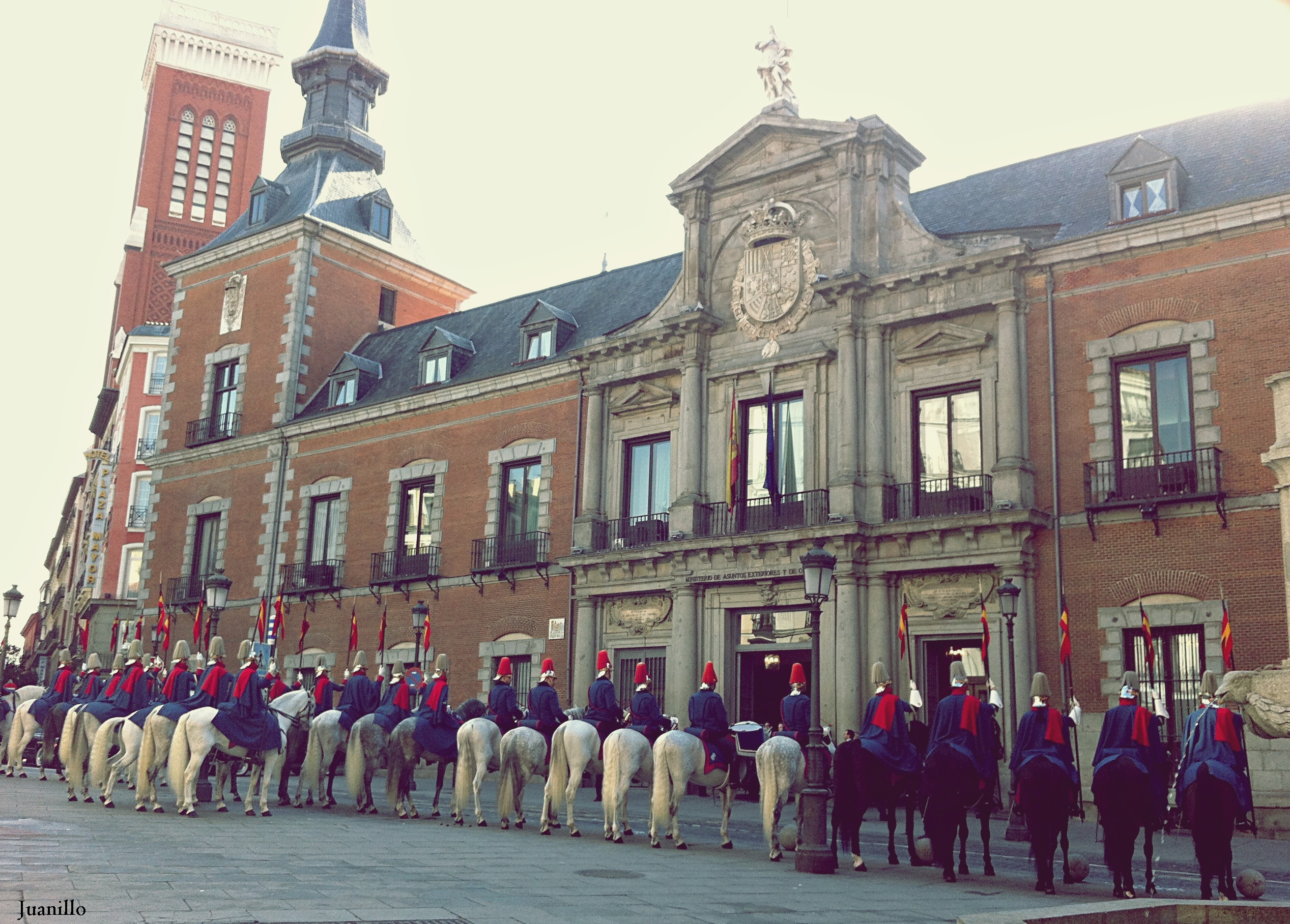 Banda y batidores del escuadrón de escolta de la Guardia Real rindiendo Honores en el Ministerio de asuntos Exteriores